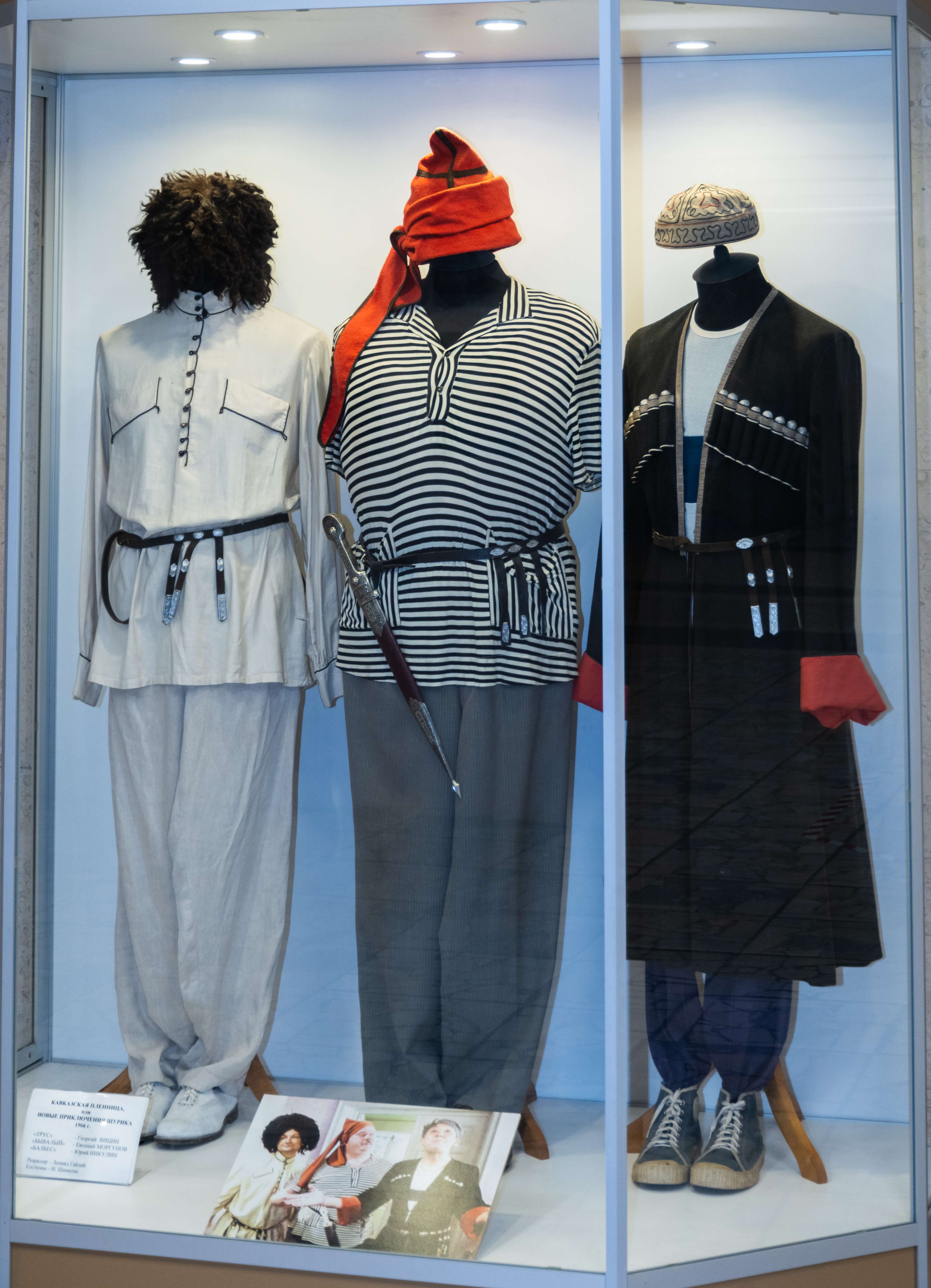 Одежда актёров в фильме «Кавказская пленница, или новые приключения Шурика» в музее Мосфильма: «Трус», «Бывалый», «Балбес»